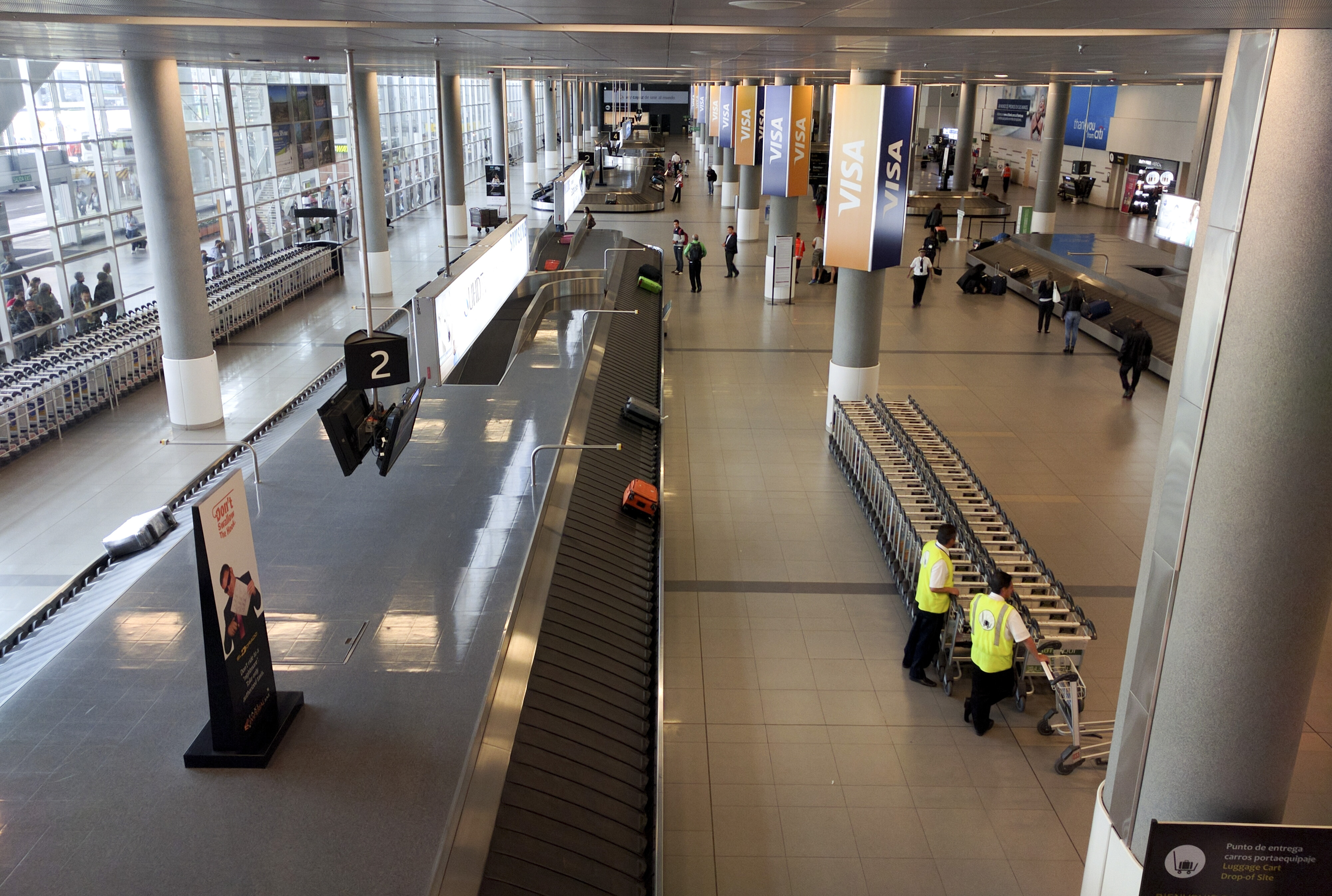 Baggage claim hall at Bogota El Dorado Airport